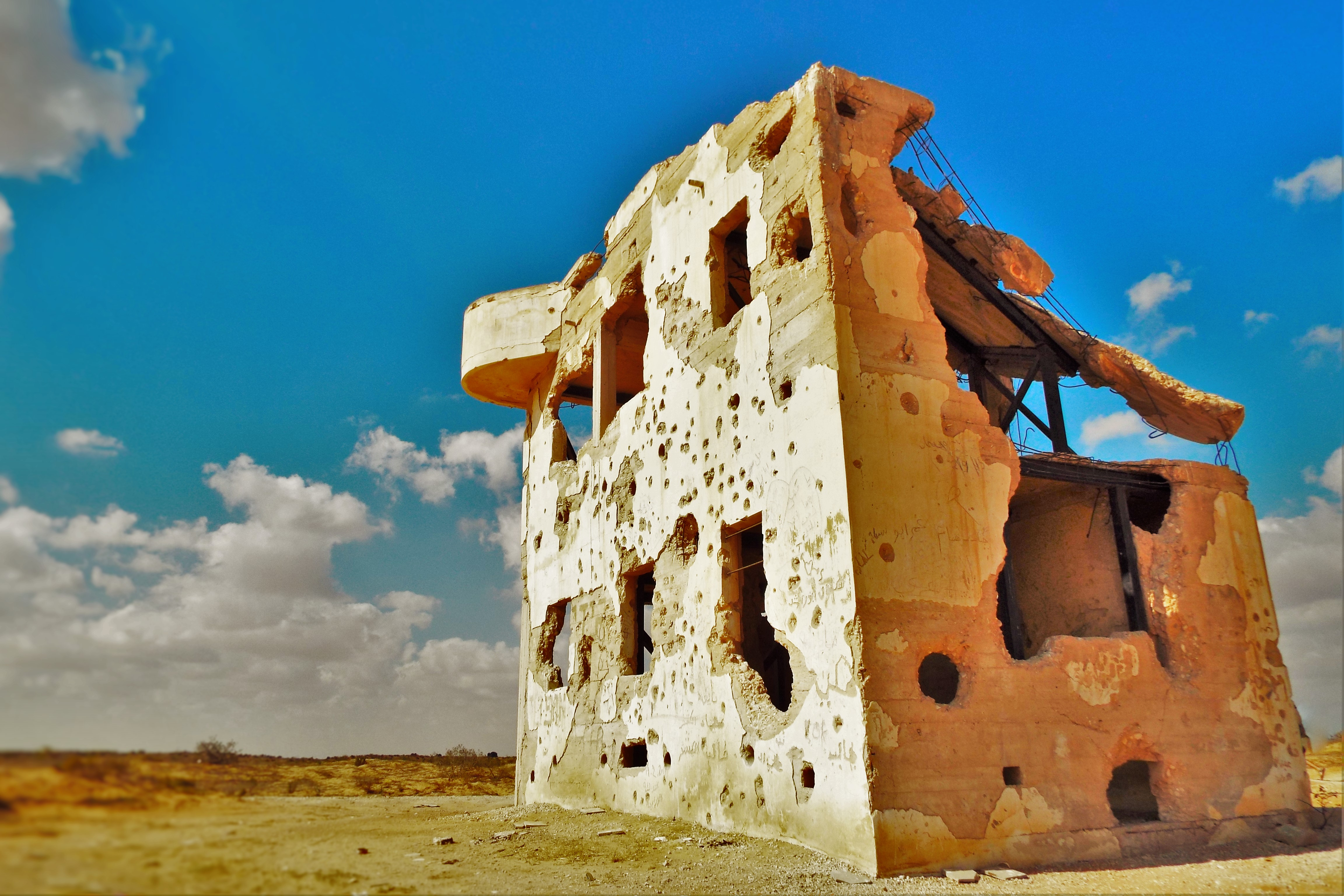 בית הביטחון נהרס על ידי צה"ל בעת אימונים בצאלים, ולאחרזמן מה הוכרז כמבנה לשימור.